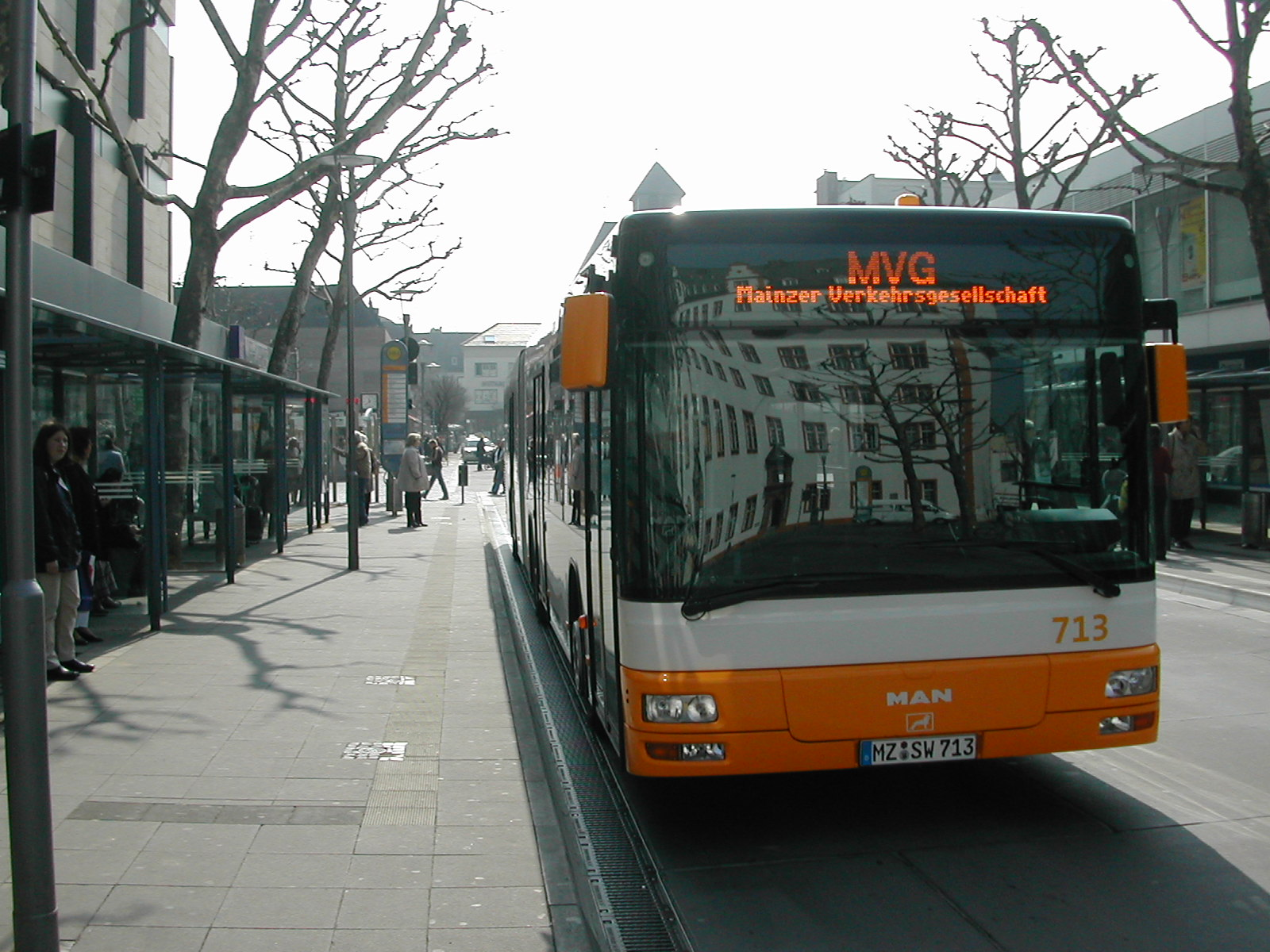 MVG-Bus 713 an der Haltestelle Höfchen